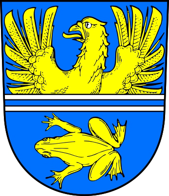 Znak obce Tršice